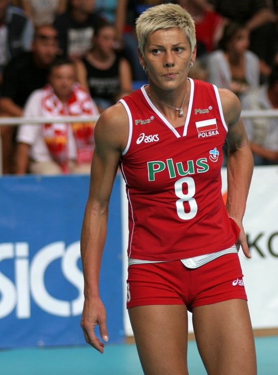 Dorota Świeniewicz - siatkarka reprezentacji Polski